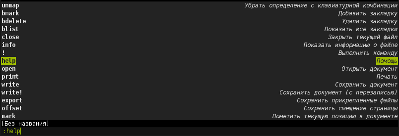 Команды Zathura